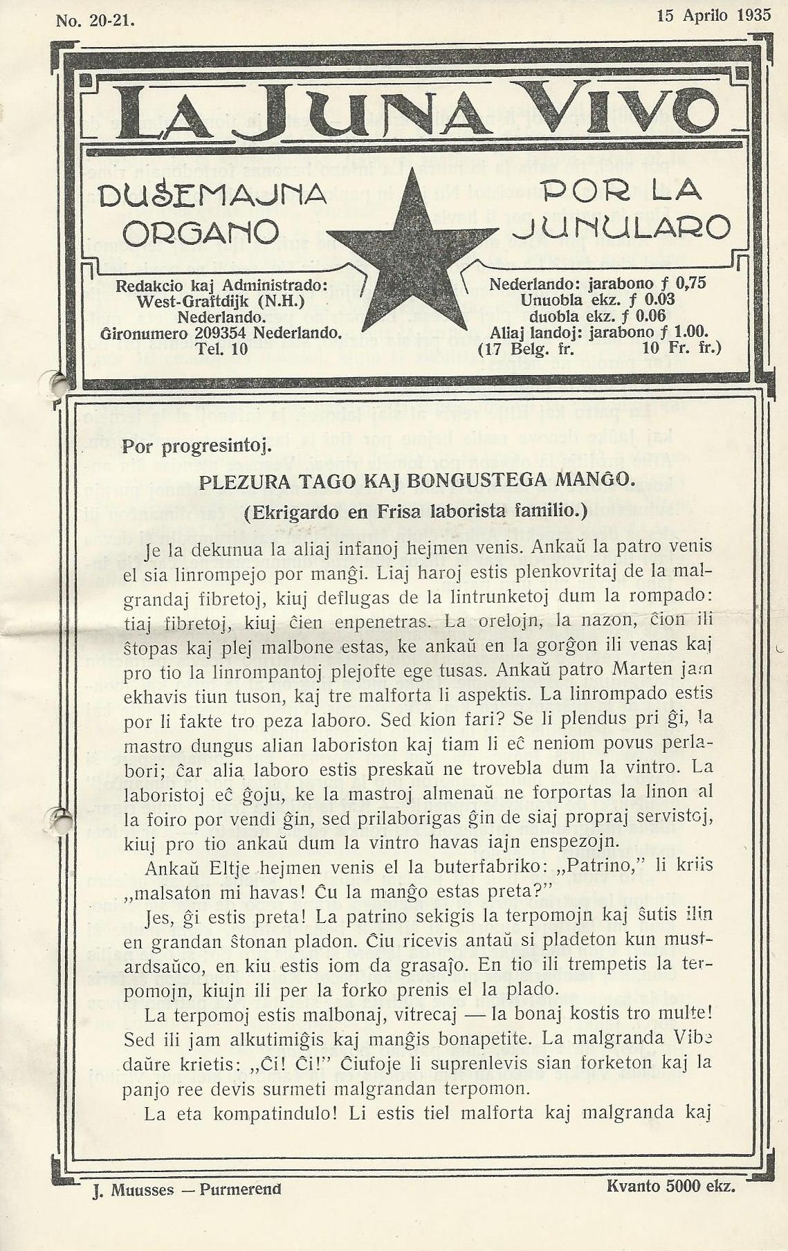 librokovrilo de "La Juna Vivo", 1935